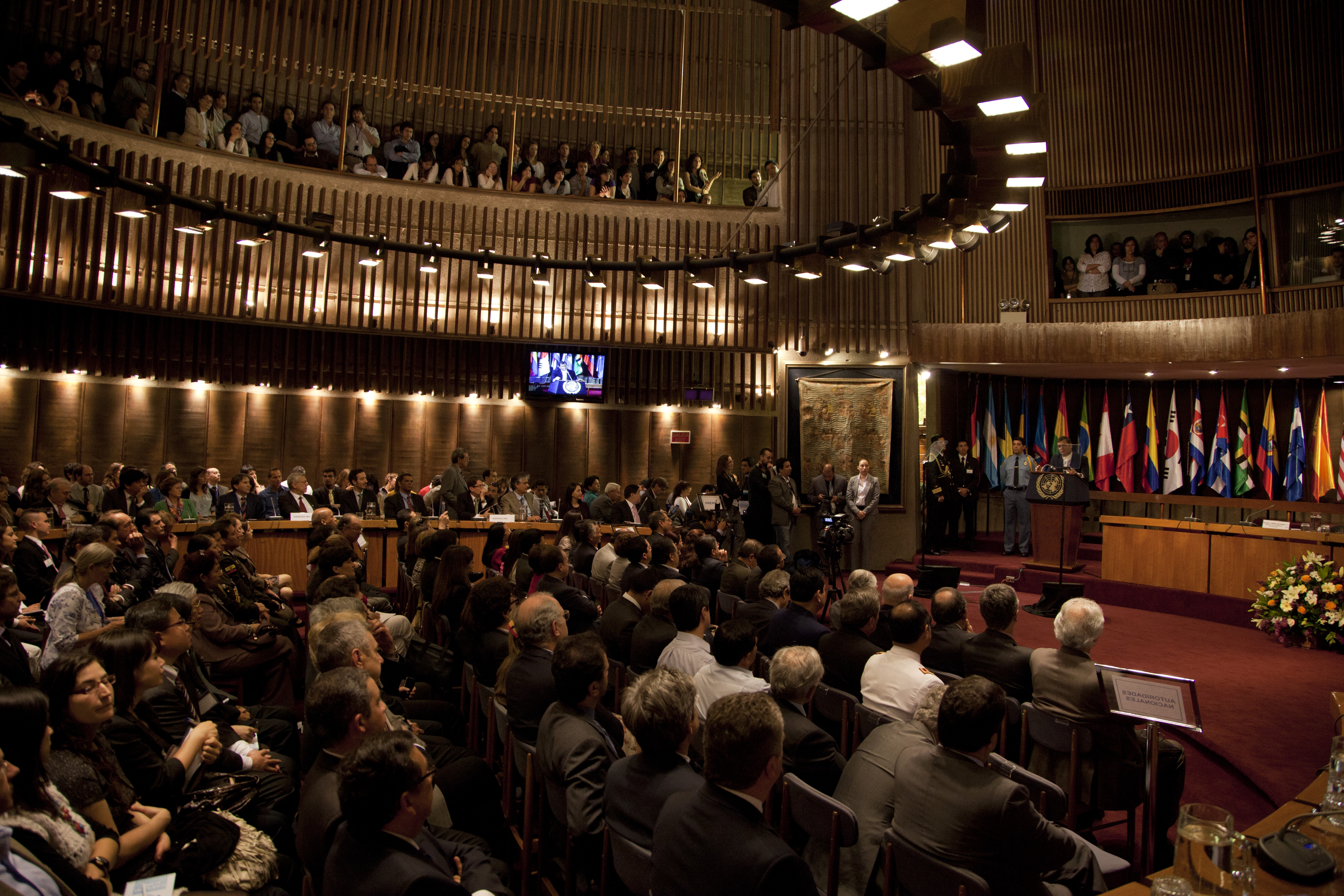 Santiago (Chile), 26 de octubre 2012. El Canciller Ricardo Patiño acompañó al Presidente Rafael Correa en la Conferencia Magistral en CEPAL que ofreció esta mañana. Foto: Fernanda LeMarie - MInisterio de Relaciones Exteriores, Comercio e Integración.